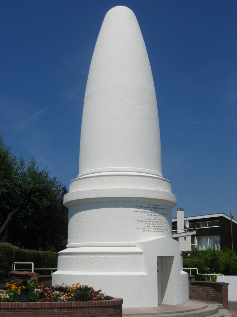 Pain de Sucre, Sainte-Adresse, Seine-Maritime, Normandie.